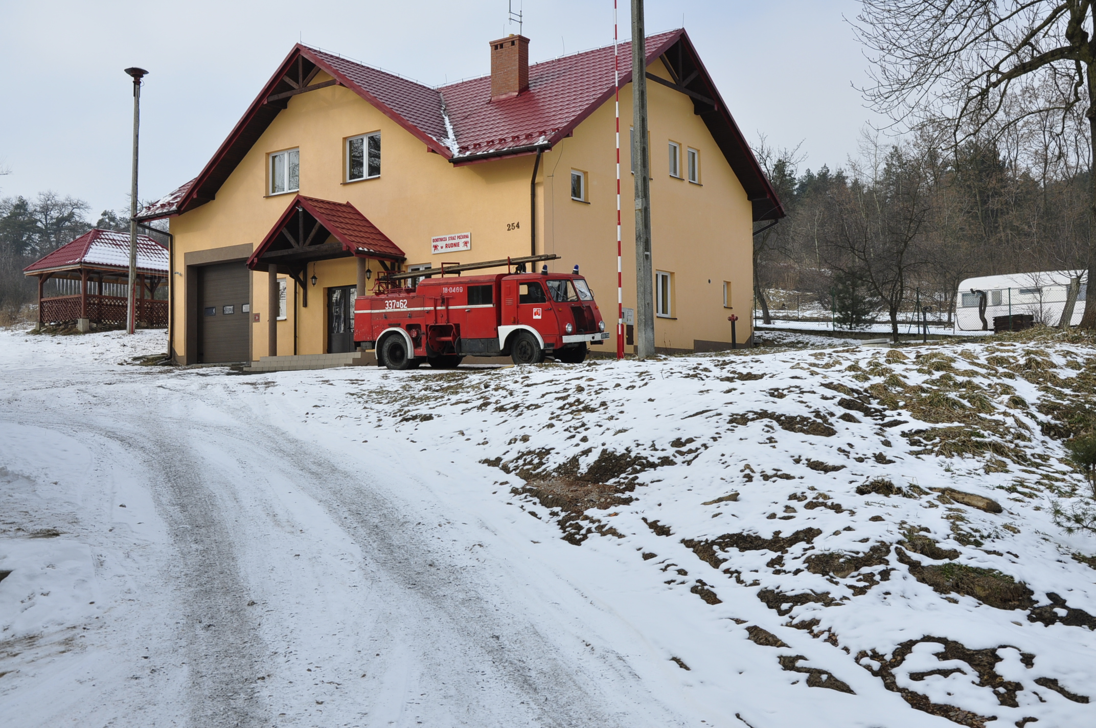 Budynek Ochotniczej Straży Pożarnej w Rudnie.